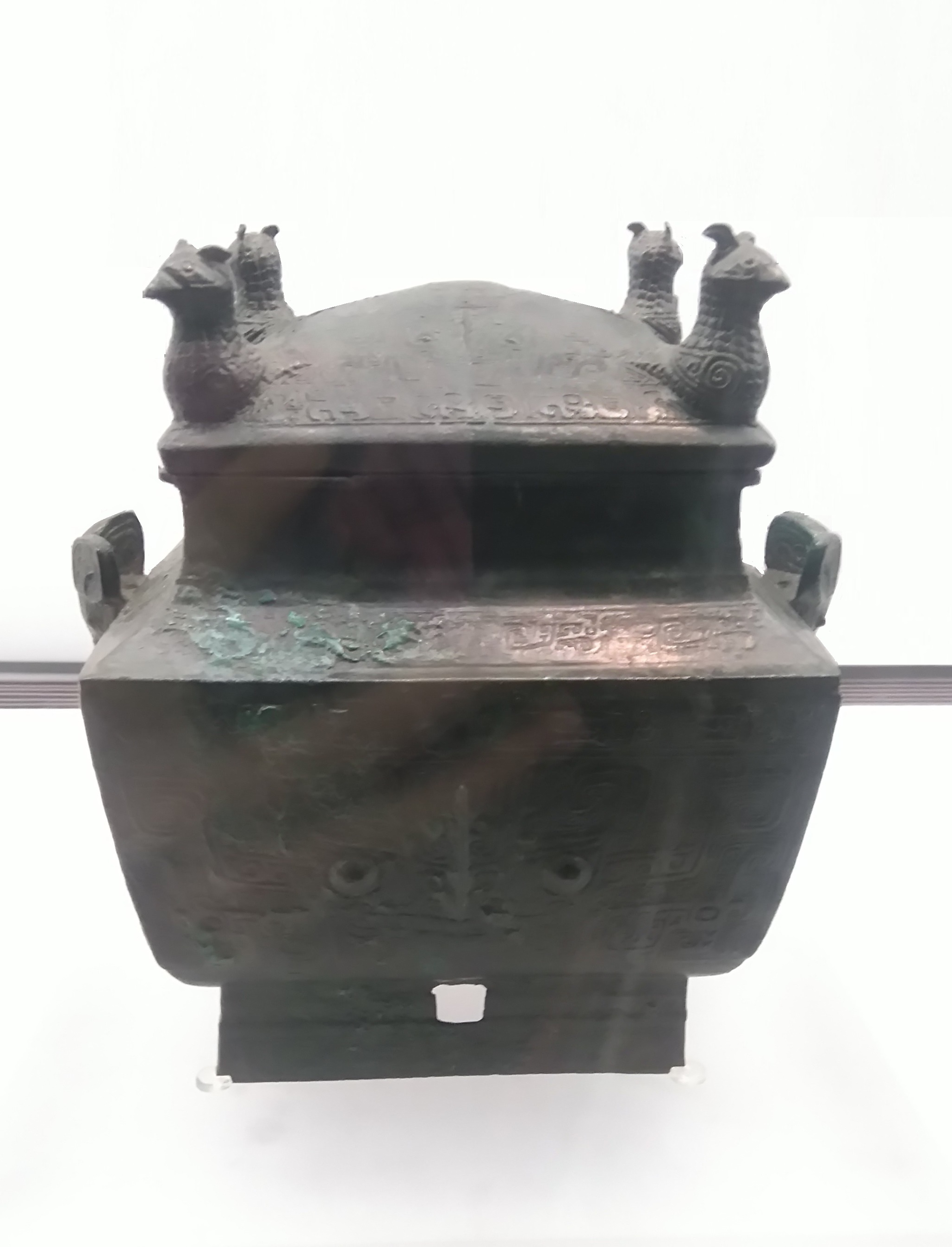 灰釉瓷梟形罐（二件），藏於國立故宮博物院